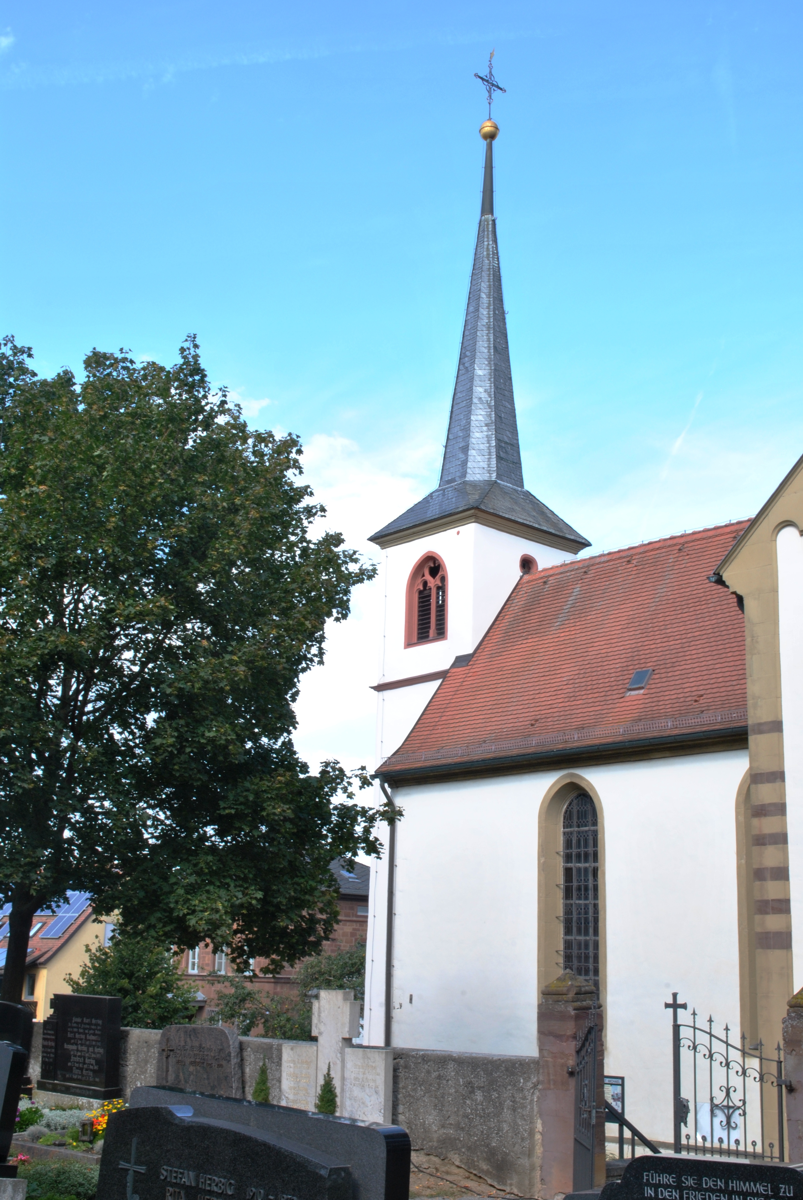 Katholische Pfarrkirche St. Michael Saalkirche mit Polygonalchor, Westturm bezeichnet „1617“, Langhaus 1627, Chor und Querschiff 1892; mit AusstattungThis is a photograph of an architectural monument.